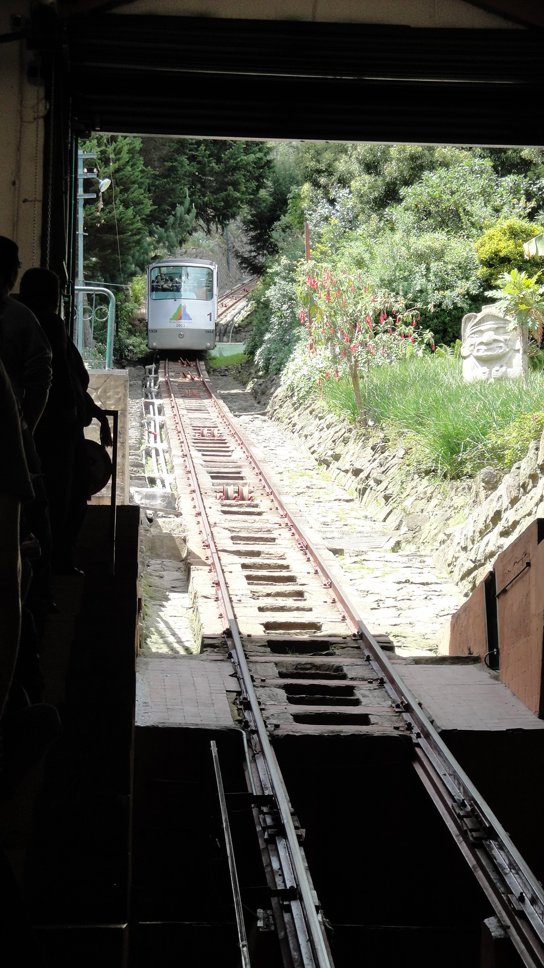 Funicular to Monserrate